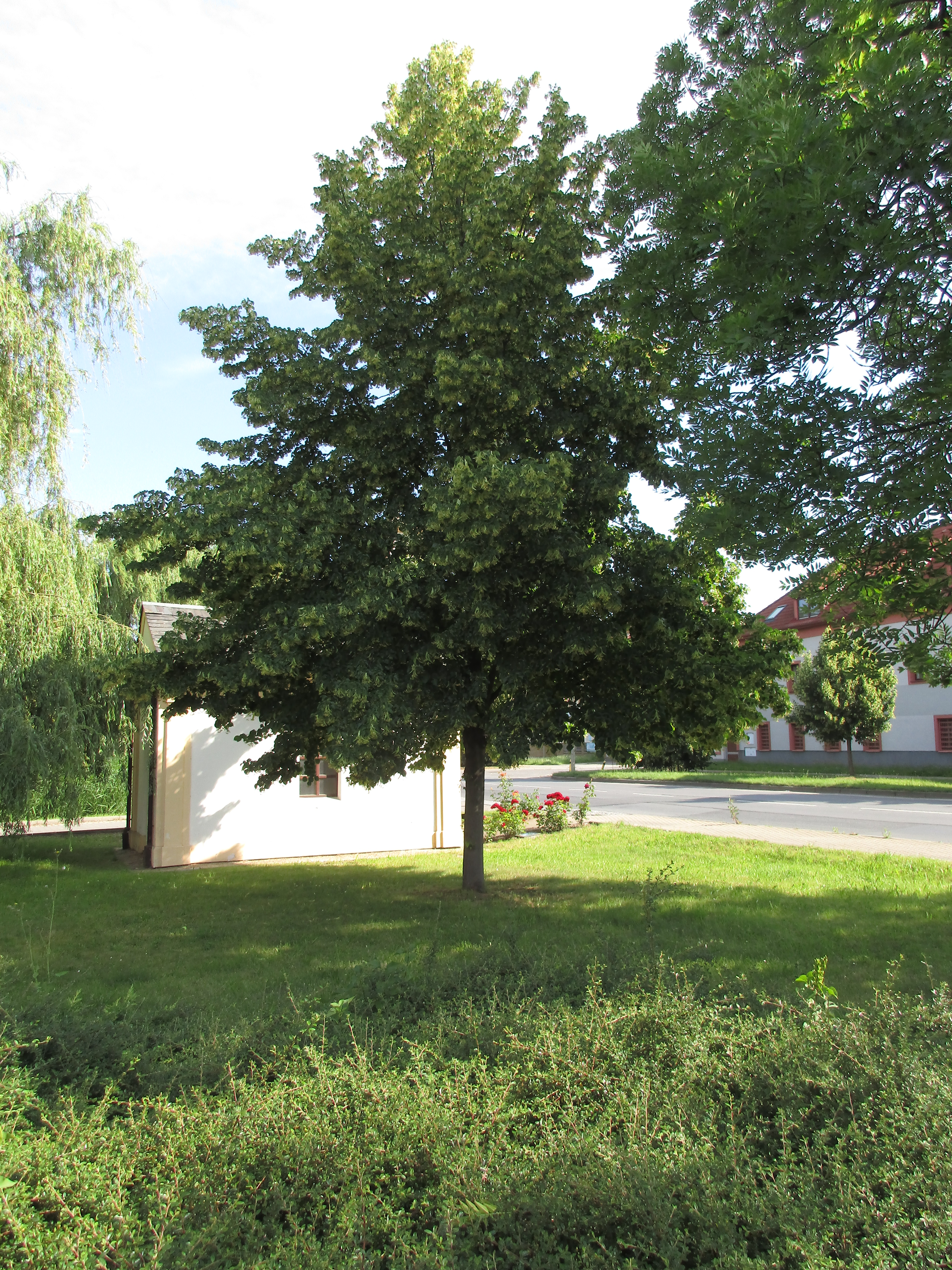 Lípa velkolistá "(Tilia platyphyllos Scop.)". Praha 10 - Dolní Měcholupy. Vysazena 28. října 1998 na památku 80. výročí vzniku Československé republiky. Významný strom, evidenční číslo MHMP: 4, v databázi od roku 2013.